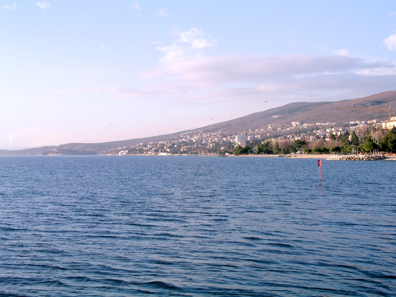 pogled na Dramalj iz Crikvenice, Hrvatska